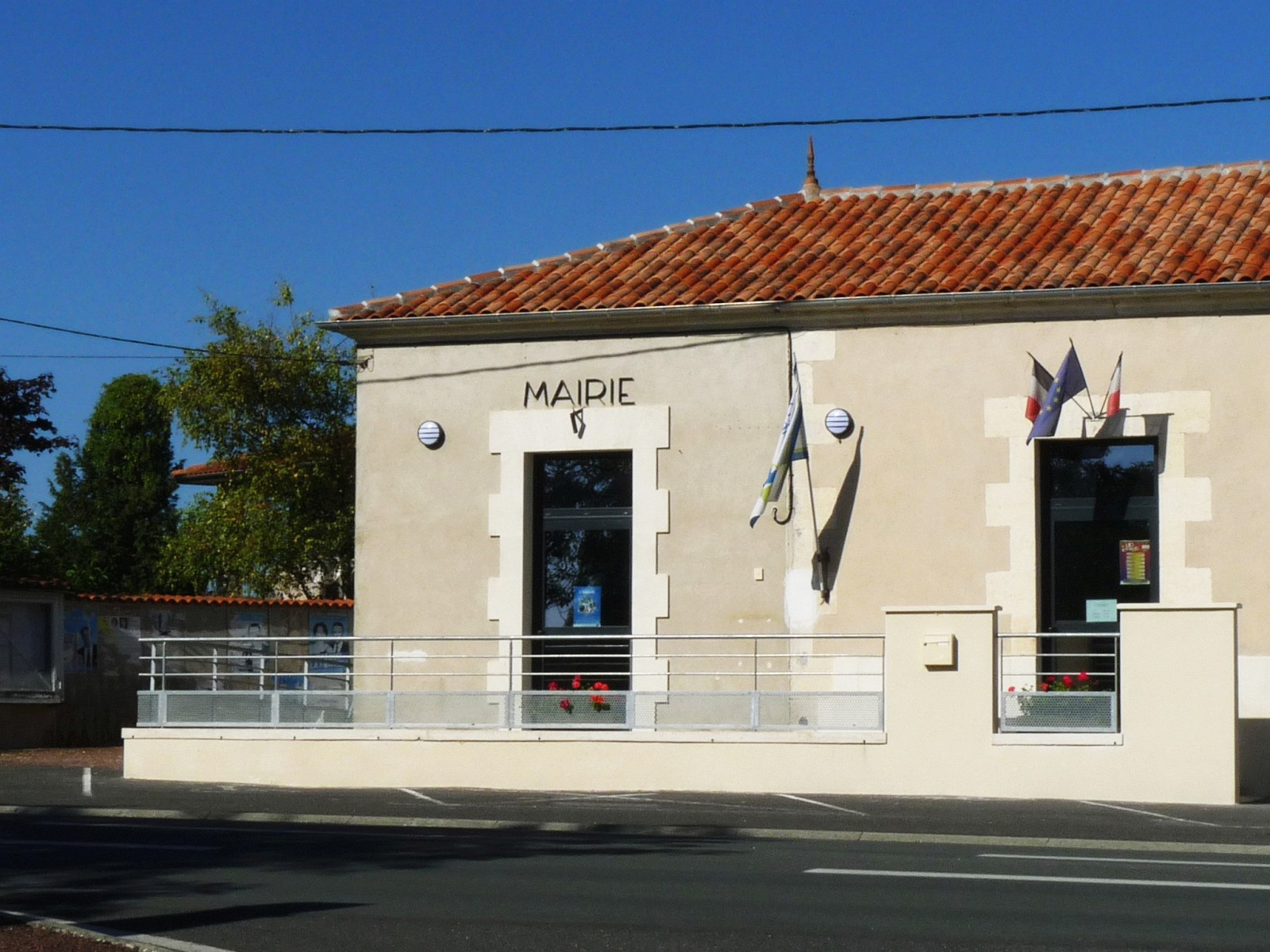 Mairie de Cierzac, Charente-Maritime, France